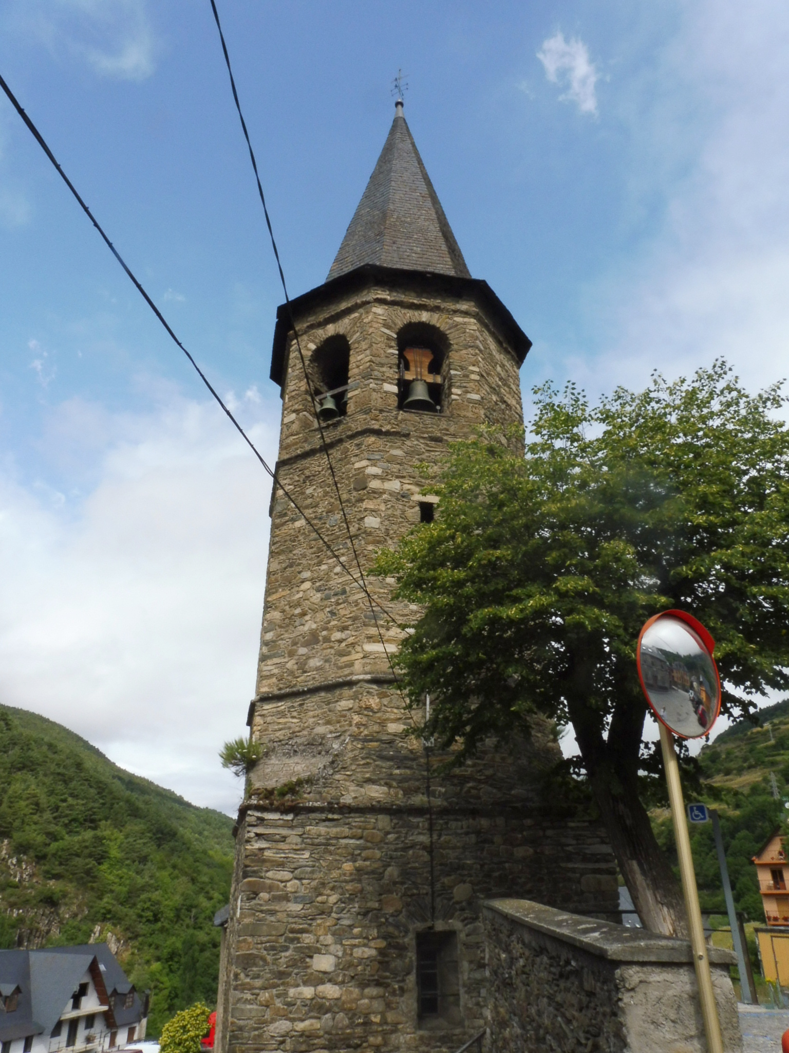 Església de la Mare de Déu del Roser d'Aubèrt (Vielha e Mijaran): campanar